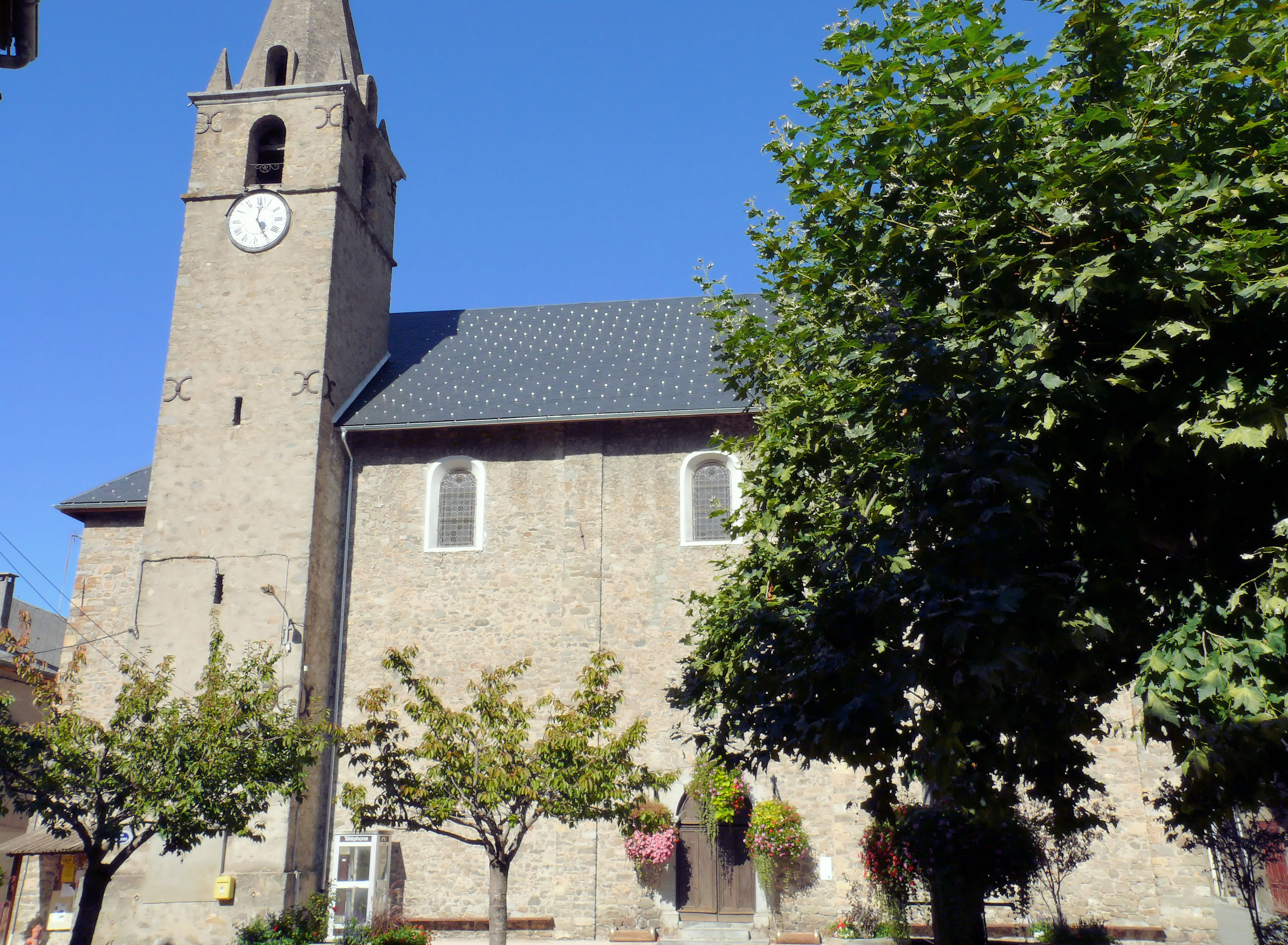 Le Lauzet-Ubaye - Eglise Saint-Laurent